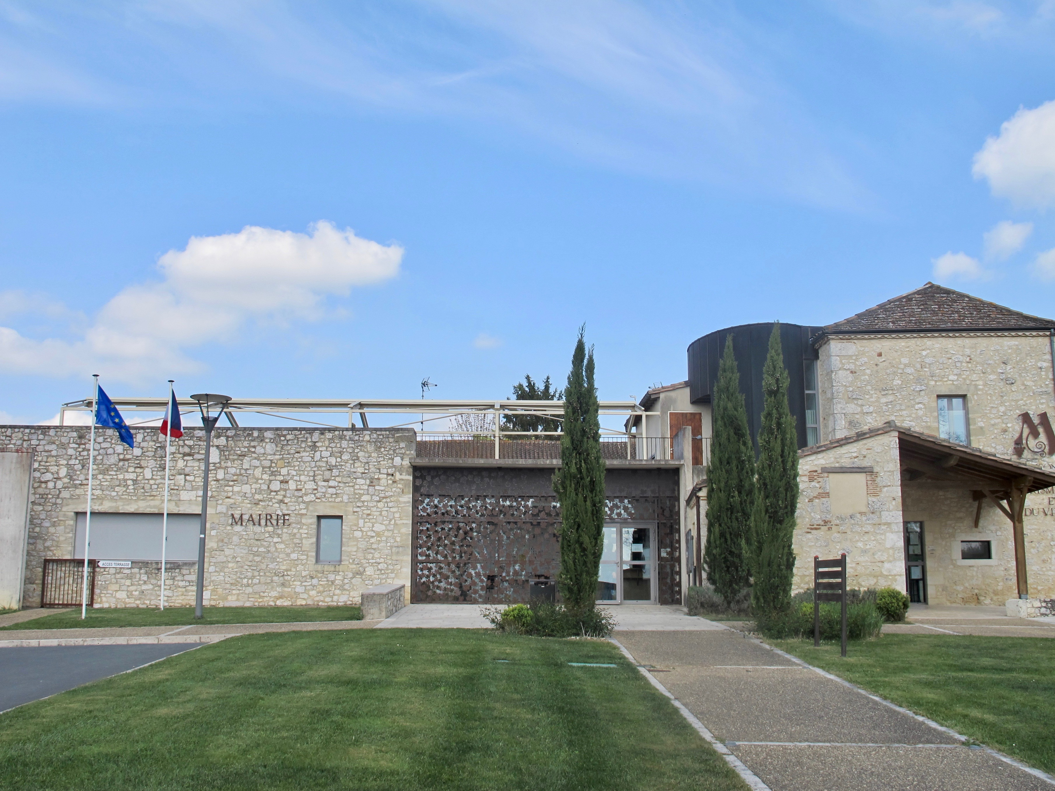 Mairie de Monbazillac (Dordogne). À droite : Maison du Tourisme et du Vin.